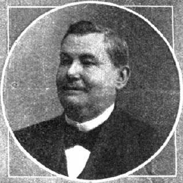 Fotografía del escritor español Manuel Fernández Juncos publicada en 1912 con motivo de la solicitud por la Liga Cervantina Universal de que se le concediera la Gran Cruz de Alfonso XII